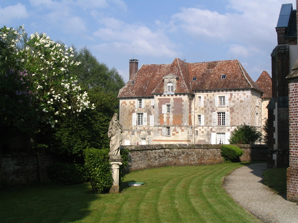 Le château de Hermival-les-Vaux, petit village de France, derrière la place de l'église